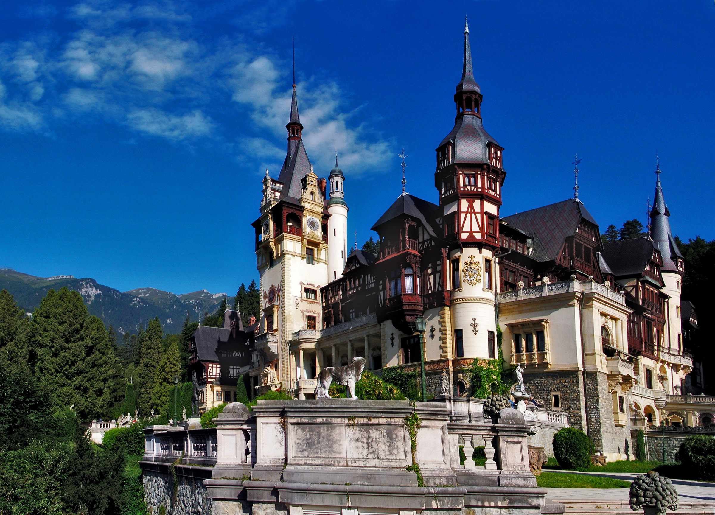 Castelul Peles si Muntele Furnica, Sinaia